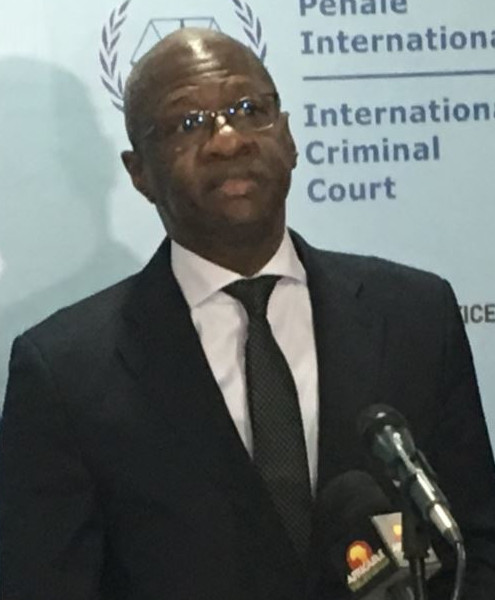 Mamadou Ismaël Konate, à Bamako, Mali, le 18 octobre 2017. (VOA/Kassim Traoré)